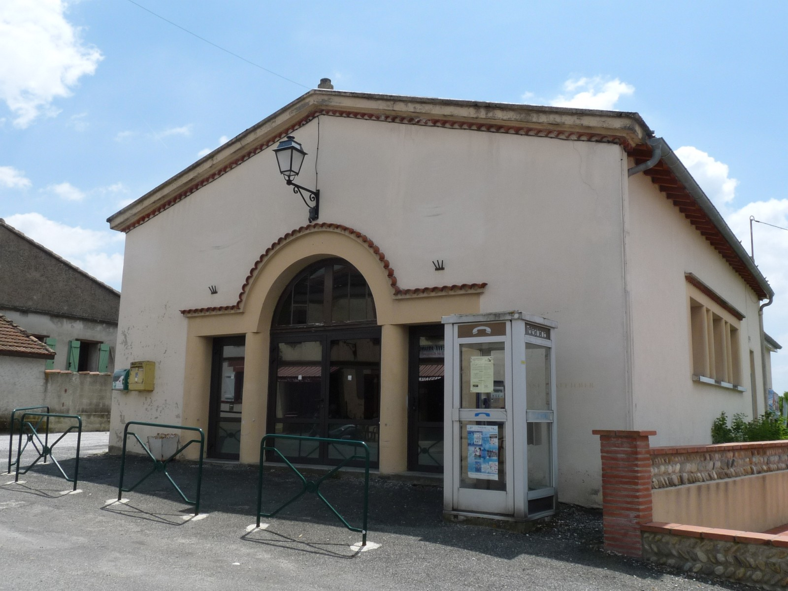 Salle des fêtes, Toutens, Haute-Garonne, France